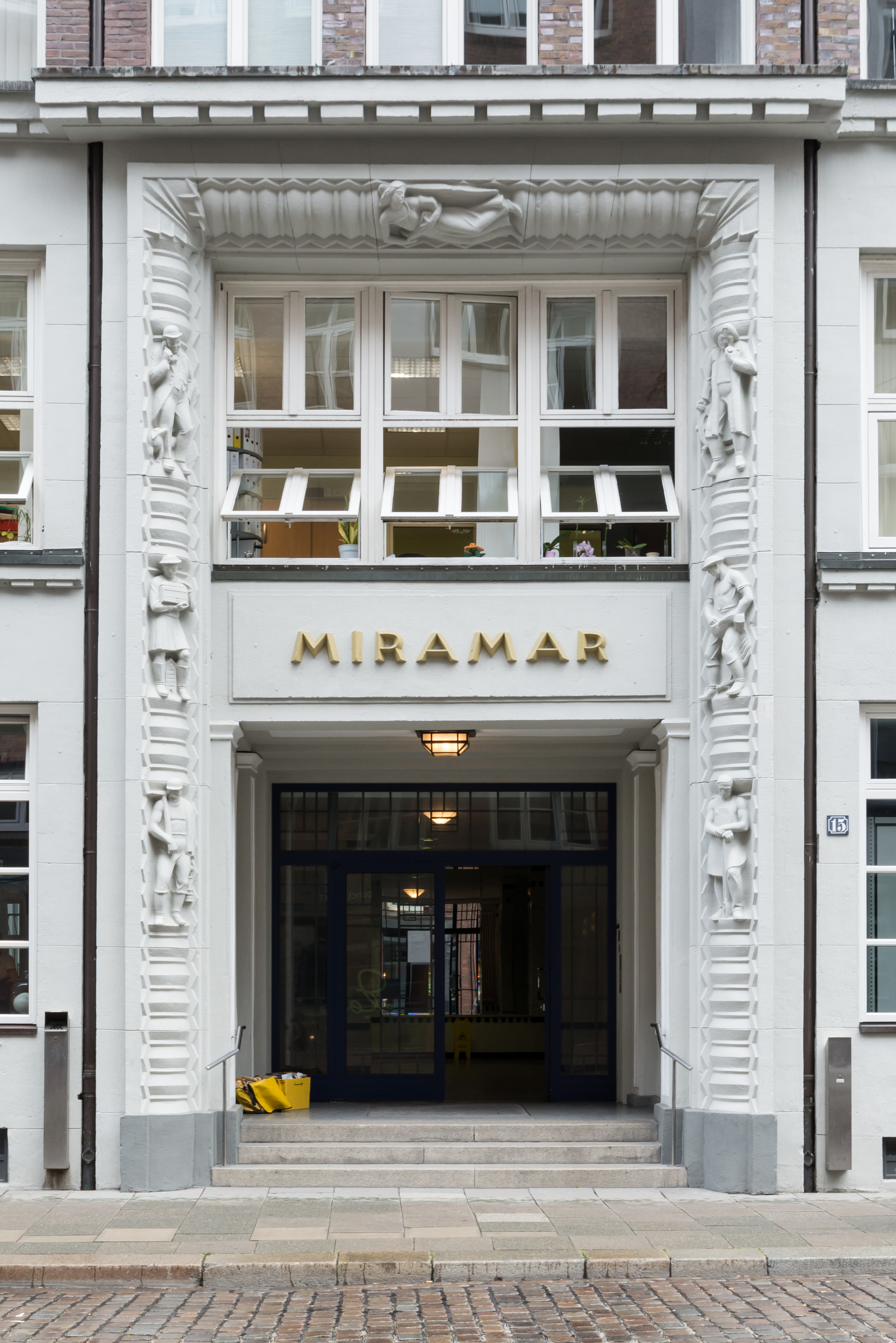 Portal des Kontorhauses Miramarhaus in Hamburg-Altstadt. This is a photograph of an architectural monument.